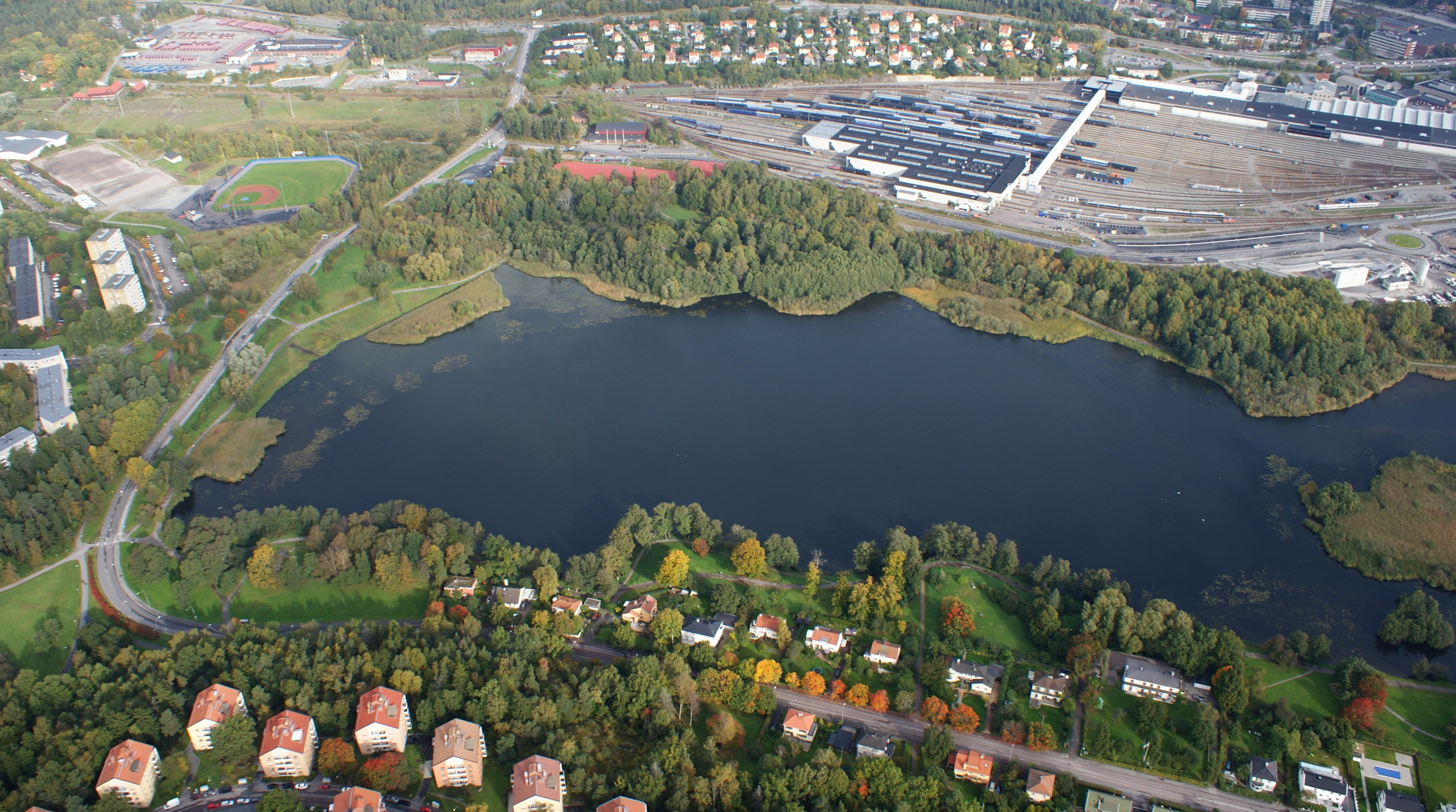 Råstasjön.